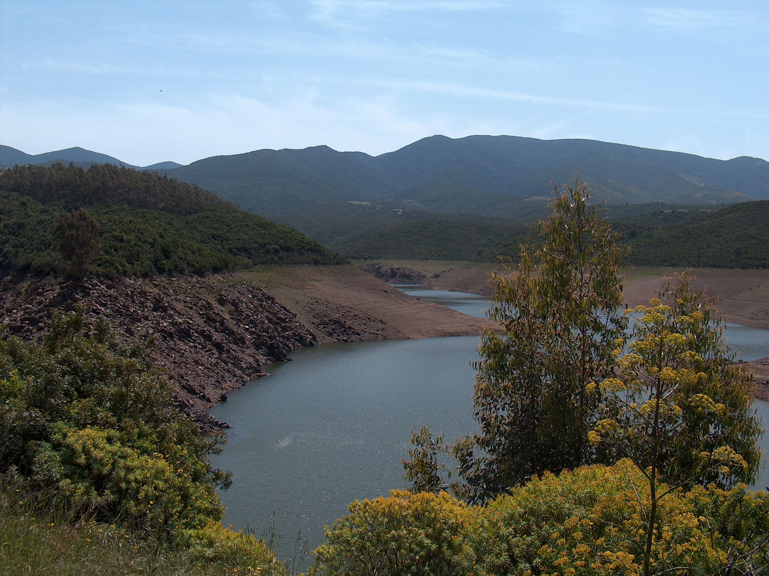 Bacino artificiale di Bau Pressiu (Nuxis, Sardegna). Nello sfondo il Monte Tamara